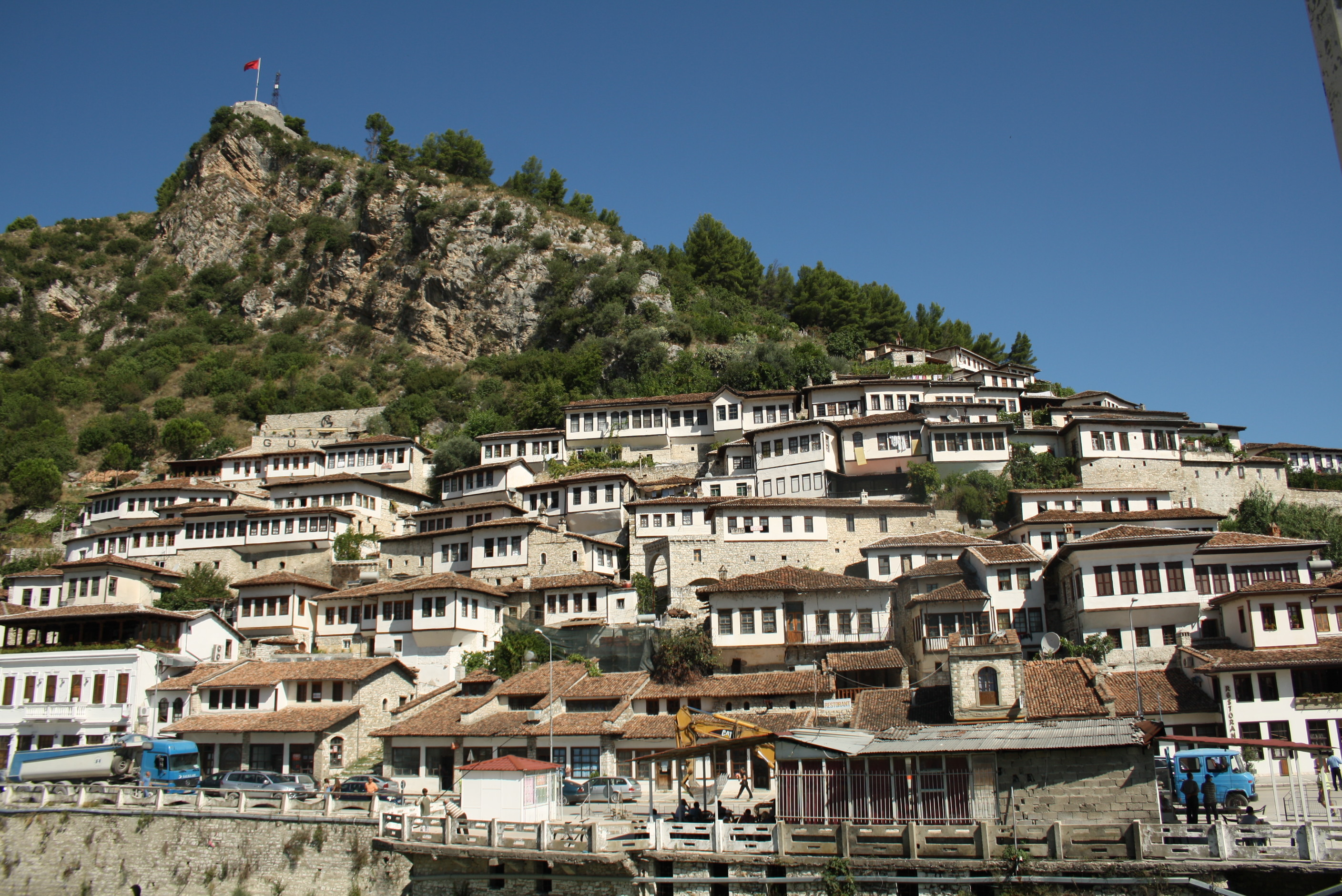 Berat, vista sul centro storico